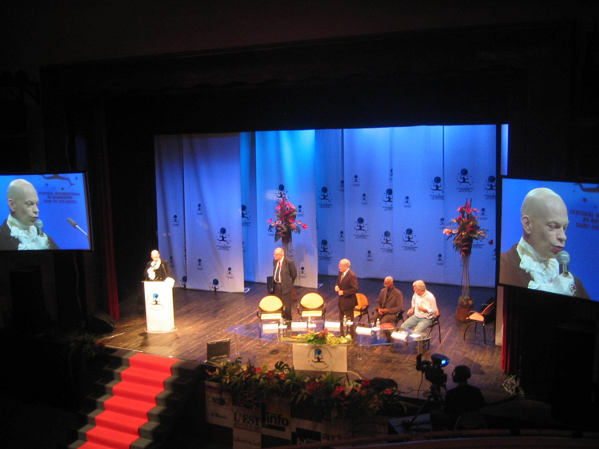 Cérémonie de clôture du 17ème Festival international de géographie à l'Espace Georges Sadoul de Saint-Dié-des-Vosges (2006)